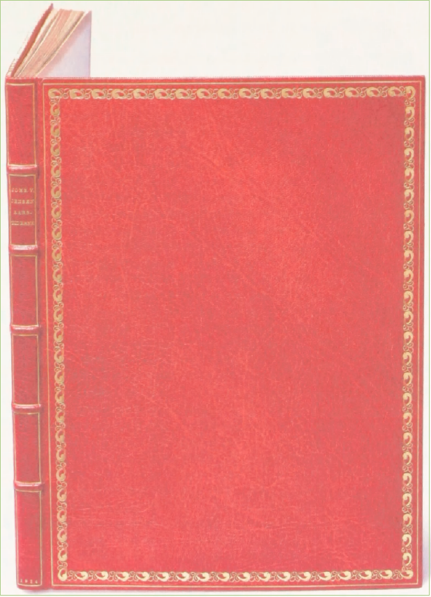 Bogbind udført ca. 1924 af den danske bogbinder August Sandgren (1893-1934) − Helbind i rødt maroquin (udførligere beskrivelse kan læses her, side 111) Bogen er Aarstiderne af Johannes V. Jensen, København: Gyldendal 1923 - Kunstindustrimuseet